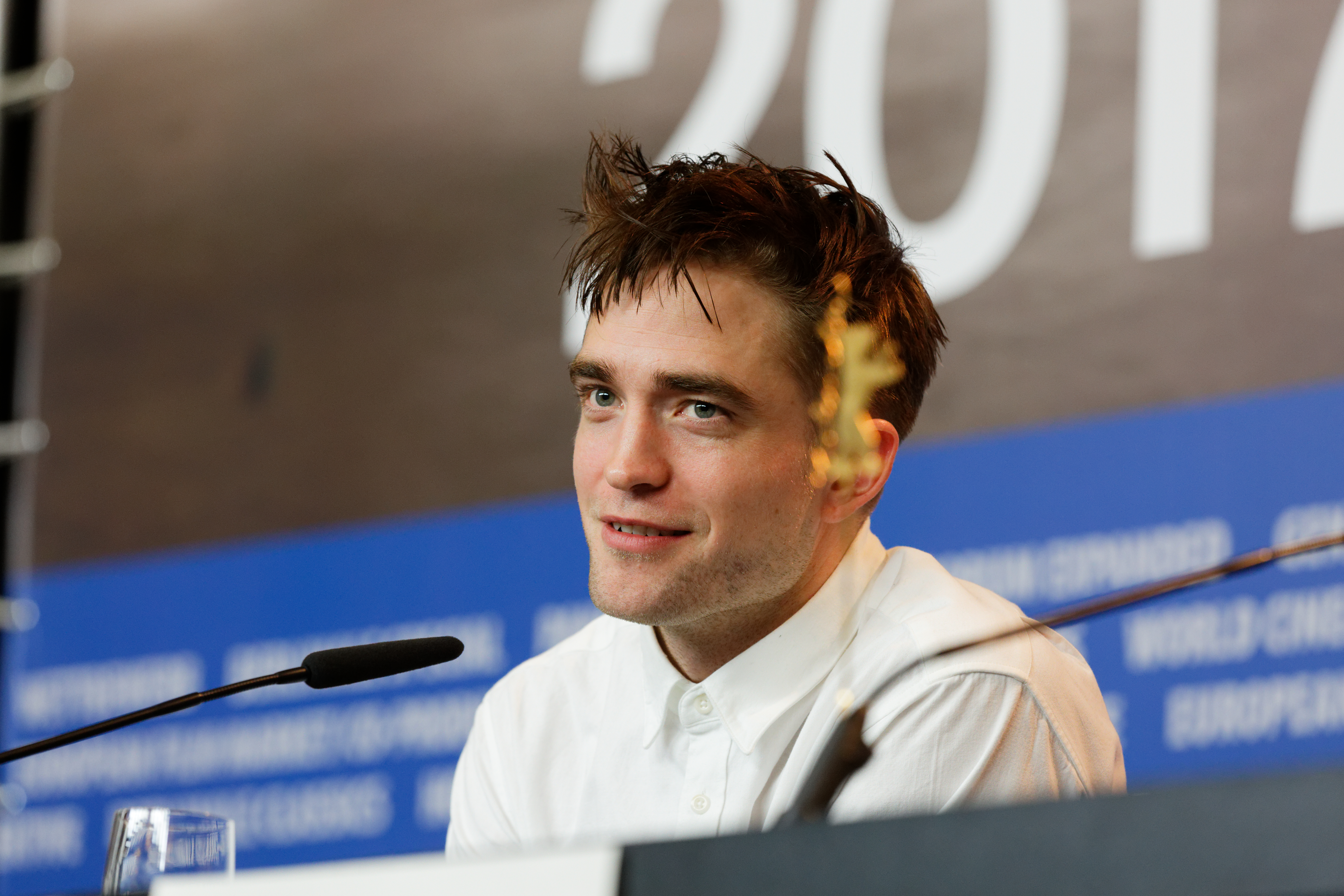 Robert Pattinson bei der Pressekonferenz zu Die versunkene Stadt Z bei der Berlinale 2017